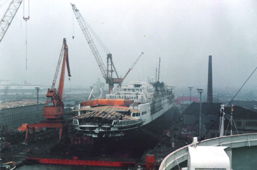 QE2 being re-engined at Bremerhaven